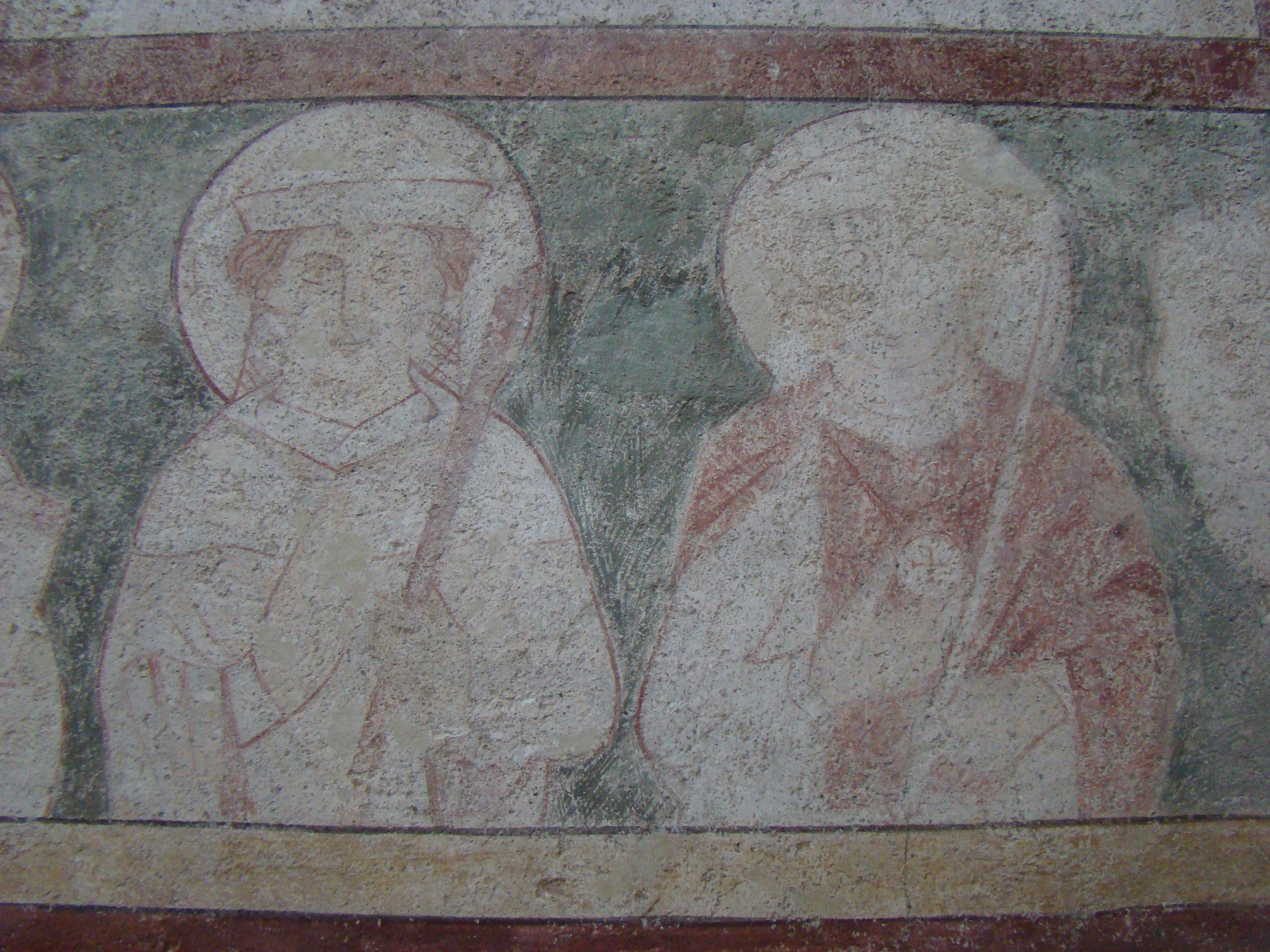 Klosterkirche Lobenfeld